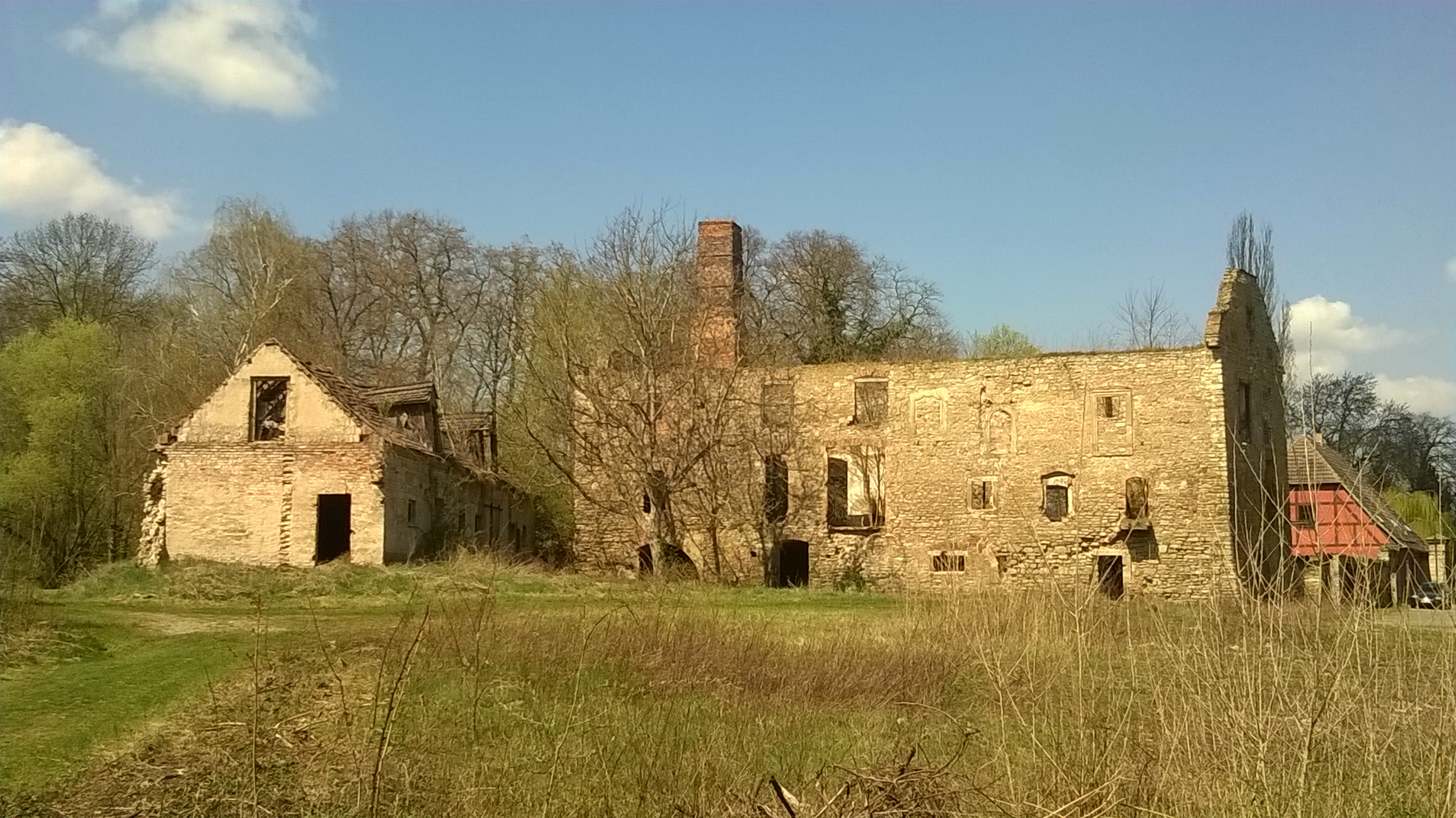 Warmsdorf